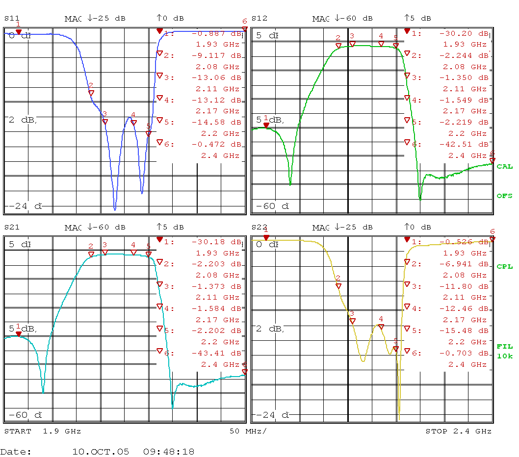 Bespielmessung mit einen Netzwerkanalysator